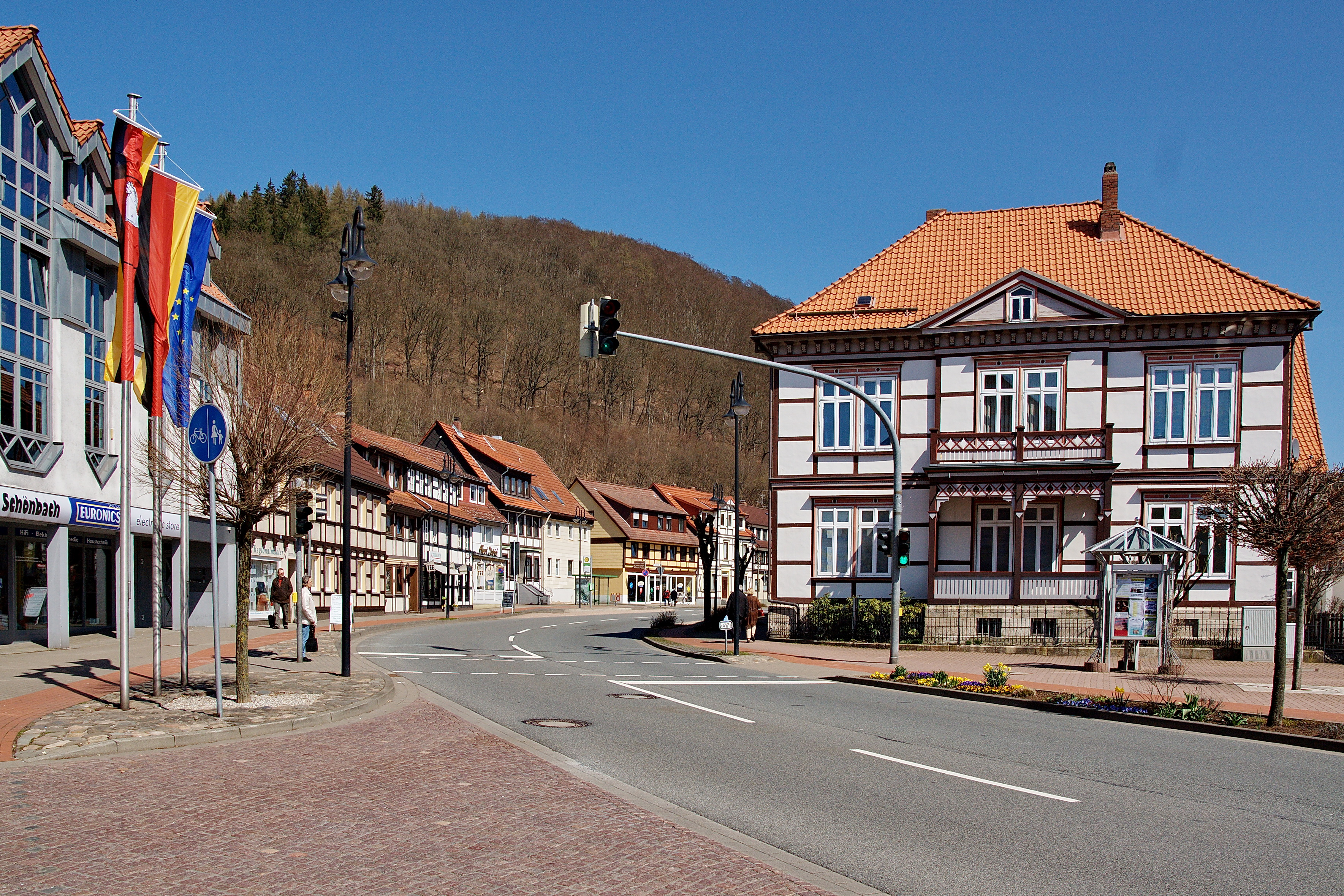 Bad Lauterberg (Harz) in Niedersachsen, Deutschland